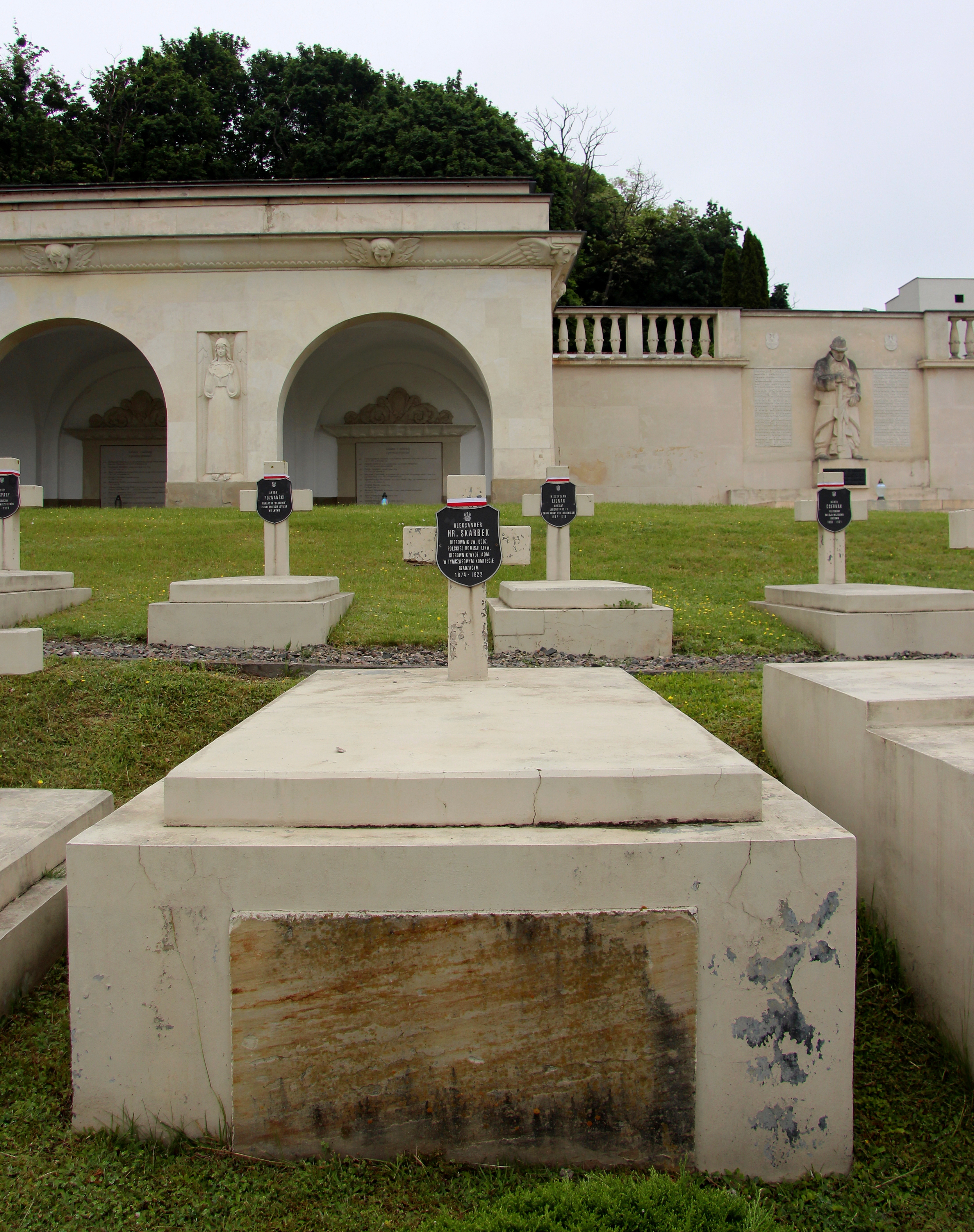 Aleksander Skarbek. Cmentarz Orląt we Lwowie .